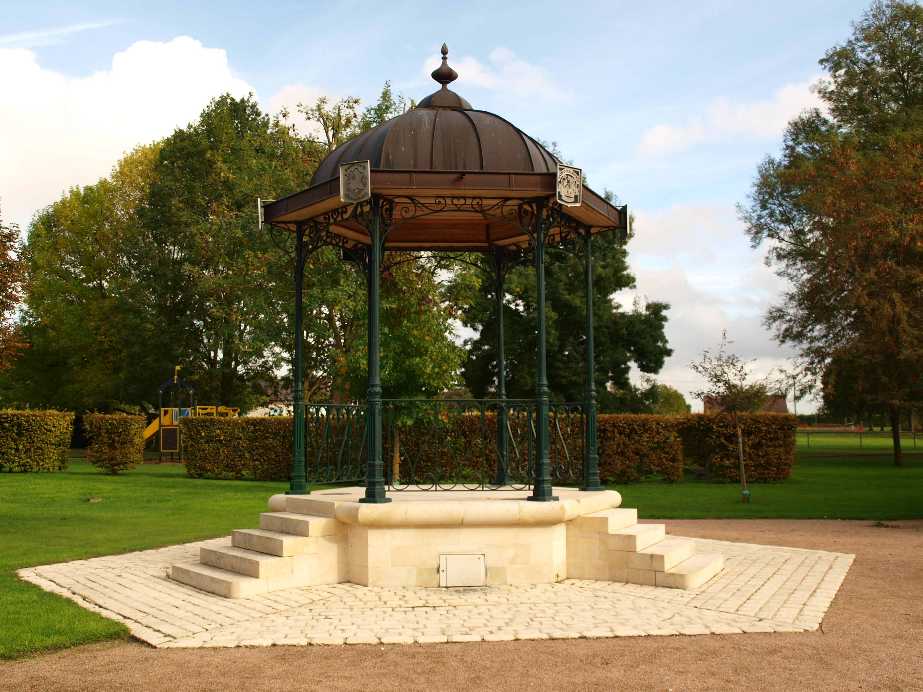 Saint-Valentin (Indre, France) ; jardin des amoureux : le kiosque.